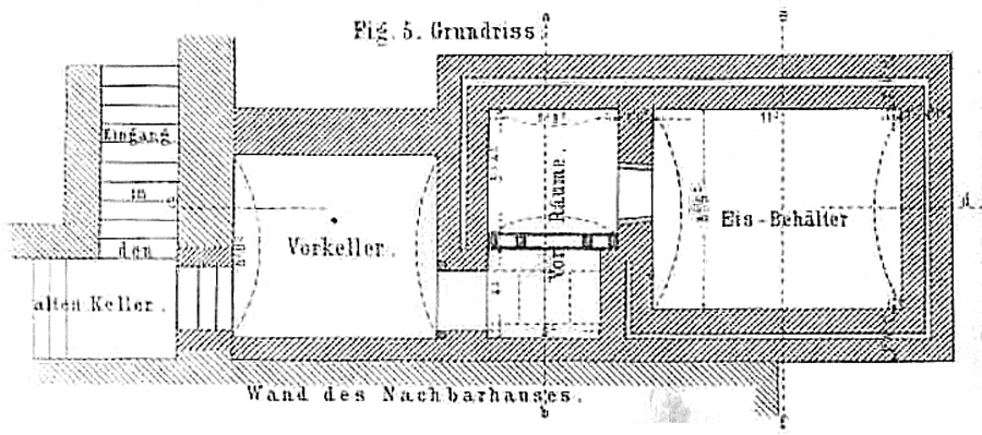 Description d'une glacière enterrée